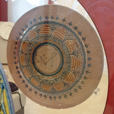 Il retro del Rosso di Montelupo